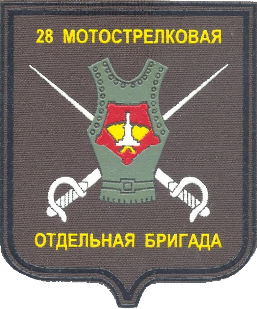 Нарукавный знак 28-й ОМСБр (Екатеринбург/Клинцы)